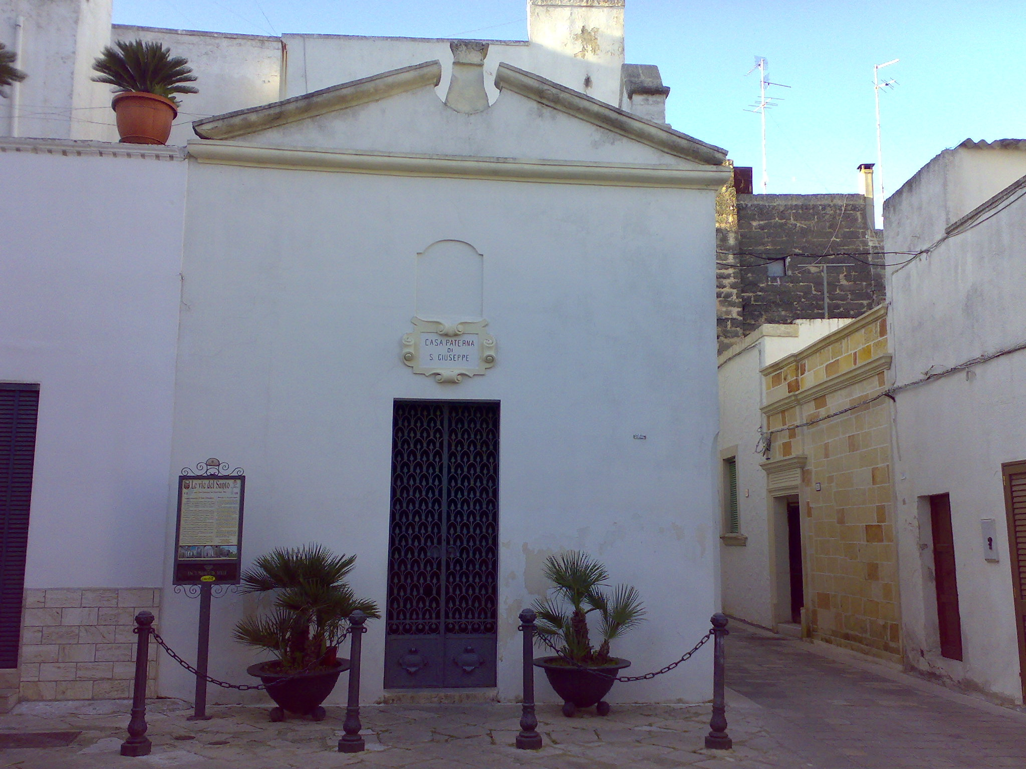 Casa paterna di San Giuseppe da Copertino, Copertino, provincia di Lecce